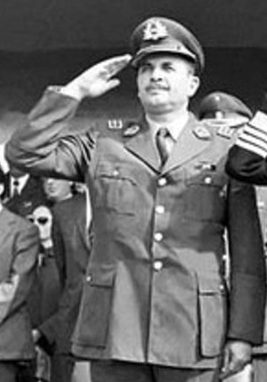 César Leonidas Mendoza Durán (Santiago de Chile, 11 de septiembre de 1918 — íd., 13 de septiembre de 1996) fue un militar, político y medallista olímpico chileno, General Director de Carabineros y jinete profesional en equitación. Fue miembro de la Junta Militar que derrocó a Salvador Allende en 1973, y se mantuvo en ella hasta su renuncia en 1985.